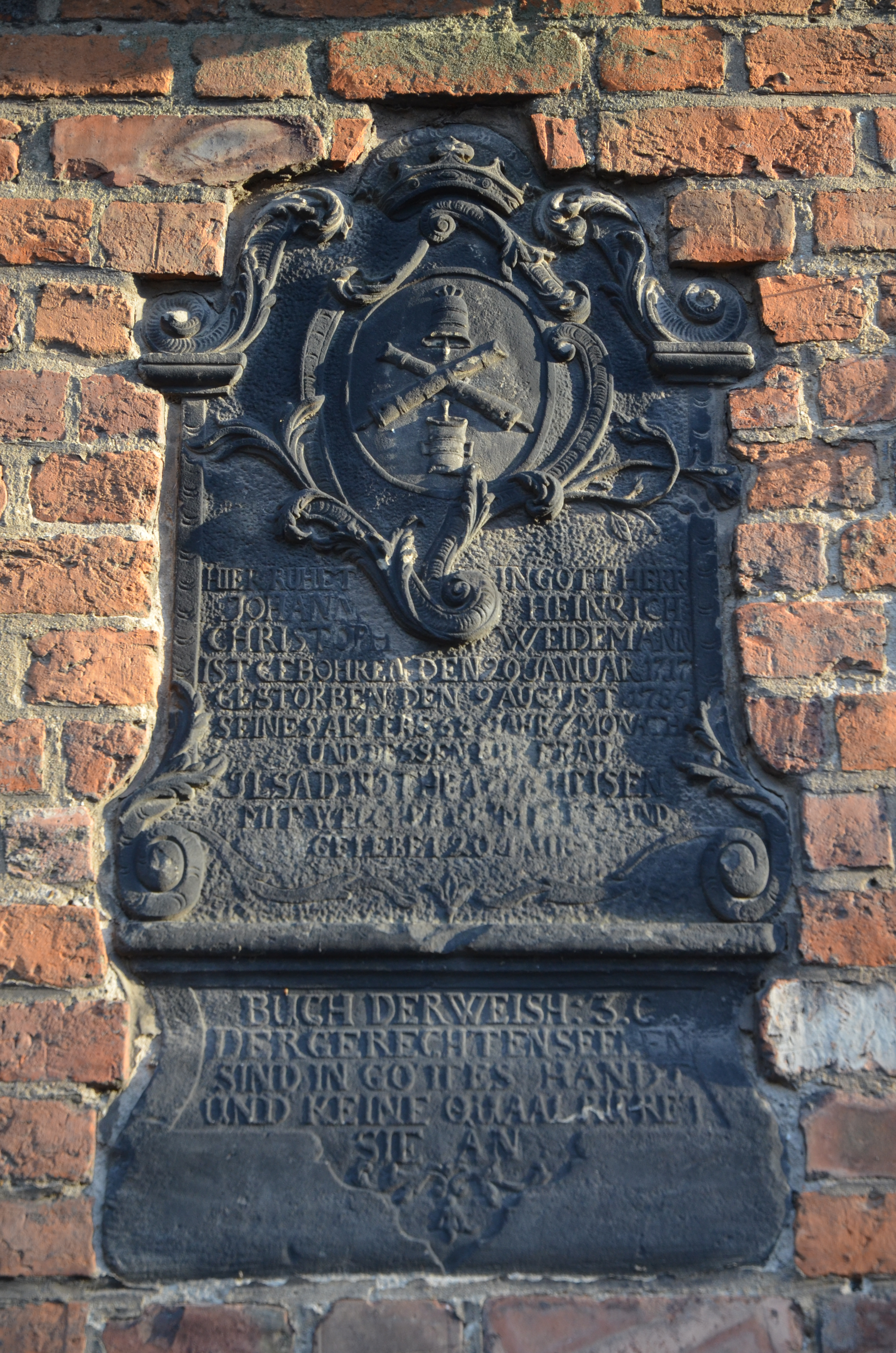 An der nördlichen Außenwand der Marktkirche in Hannover findet sich fast an der Schmiedestraße diese Grabstele für den zuvor am Steintor (Hannover)|Steintor tätigen Stück- und Glockengießer Johann Heinrich Christoph Weidemann (1717-1785) und dessen Ehefrau Ilsa Dorothea Heise (Heisen). Deutlich sind in dem bekrönten Schild zwei gekreuzte Geschützrohre für Kanonen zu sehen, darüber eine Kirchenglocke, senkrecht darunter ein gegossener Mörser zum Zerreiben mit einem Stößel ...